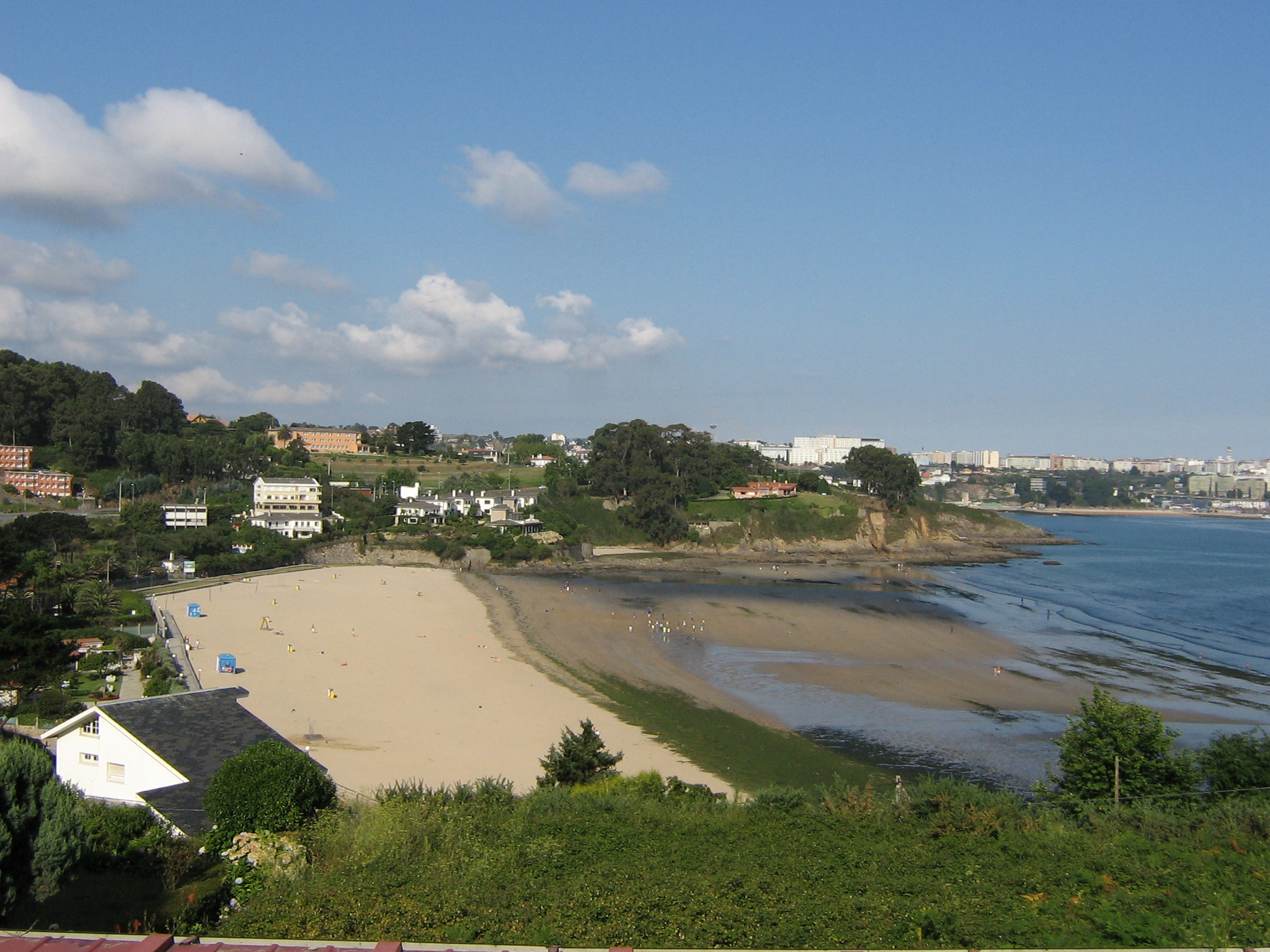 Praia de Bastiagueiro (Oleiros, A Coruña).